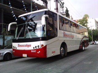 Autobus Grupo Temascalapa